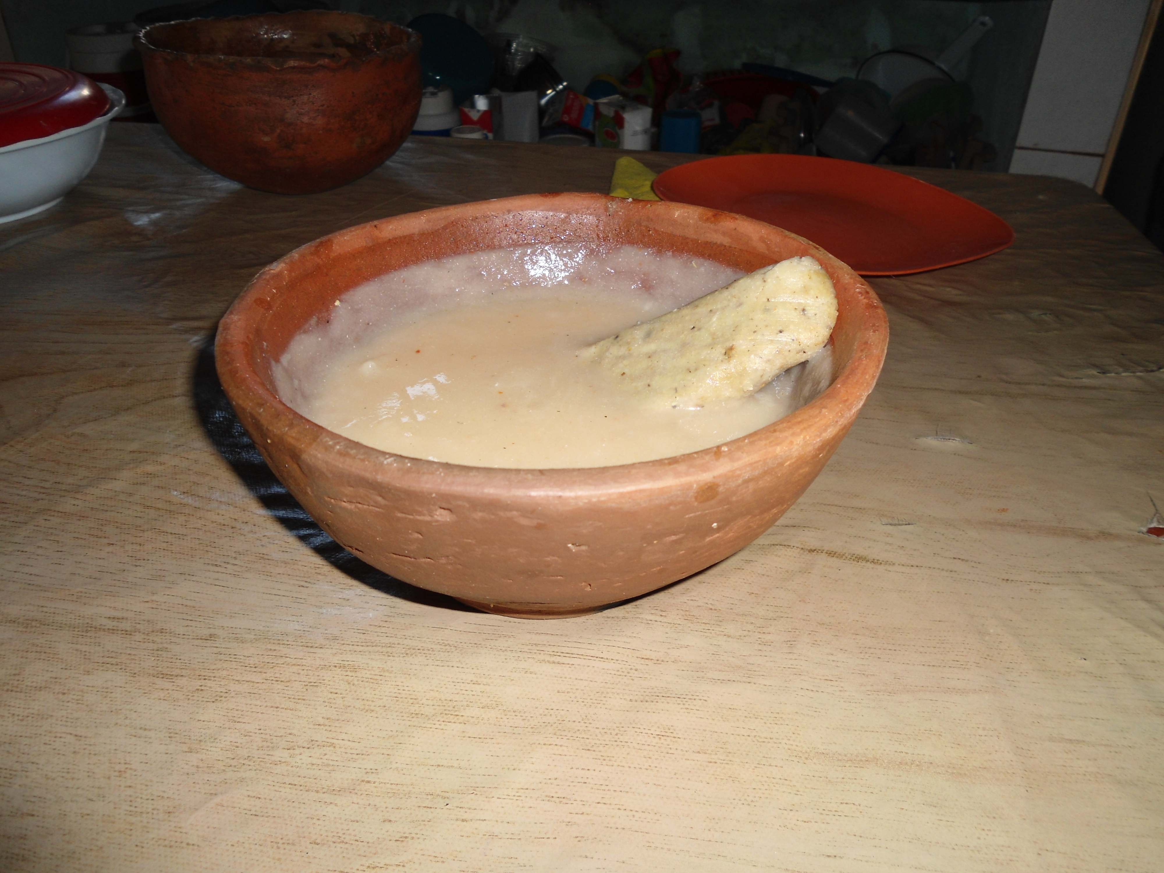 El Uliche cuyo nombre en chontal signifca "mole" es quizá el platillo tipco más antiguo de Tabasco y forma parte de la gastronomia indigena chontal. Es muy consumdo durante el dia de muerto en las comundades rurales del estado principalmente en los municipios de Nacajuca Centro Macuspana y Centla.